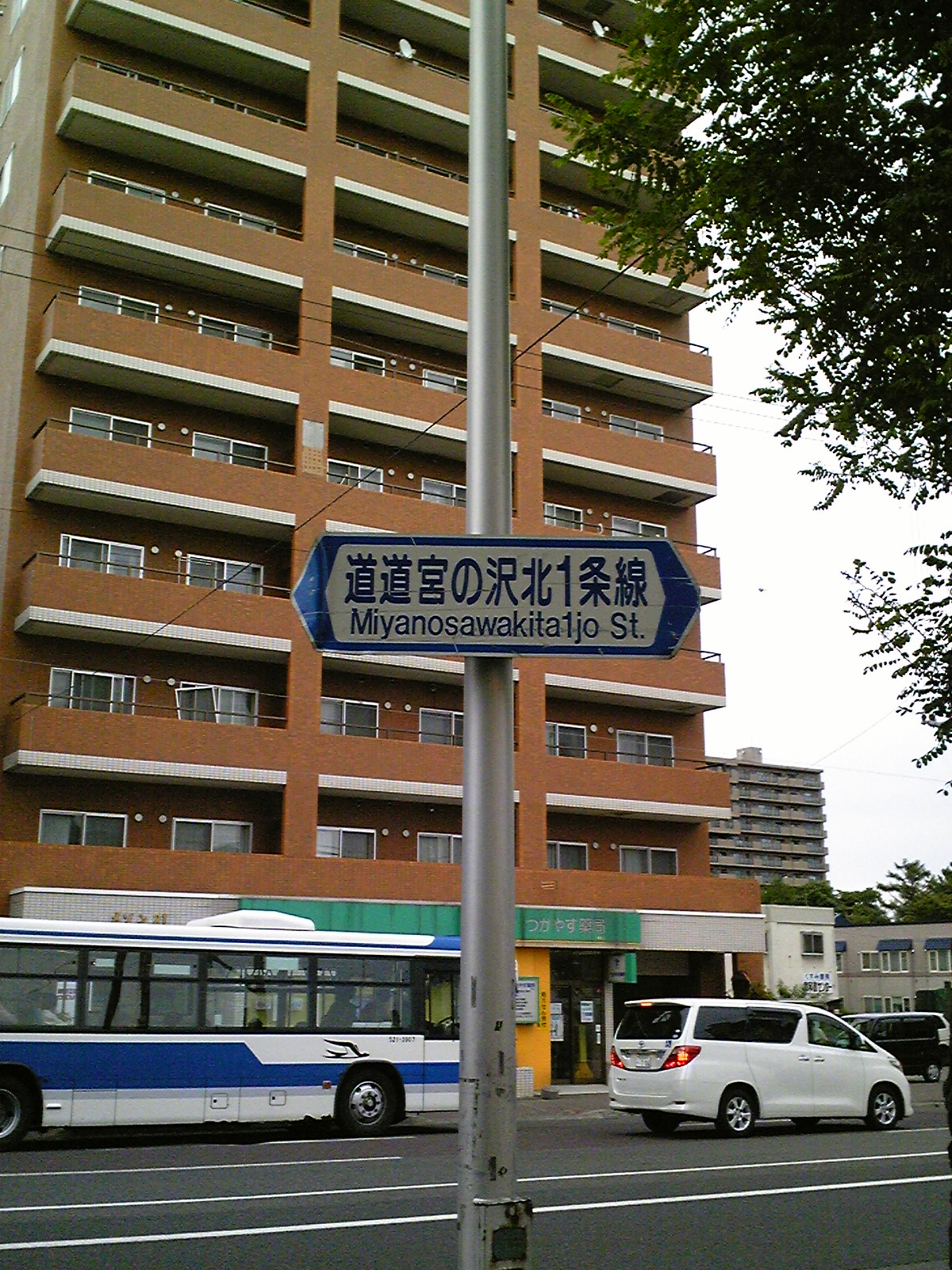 北海道道124号標識